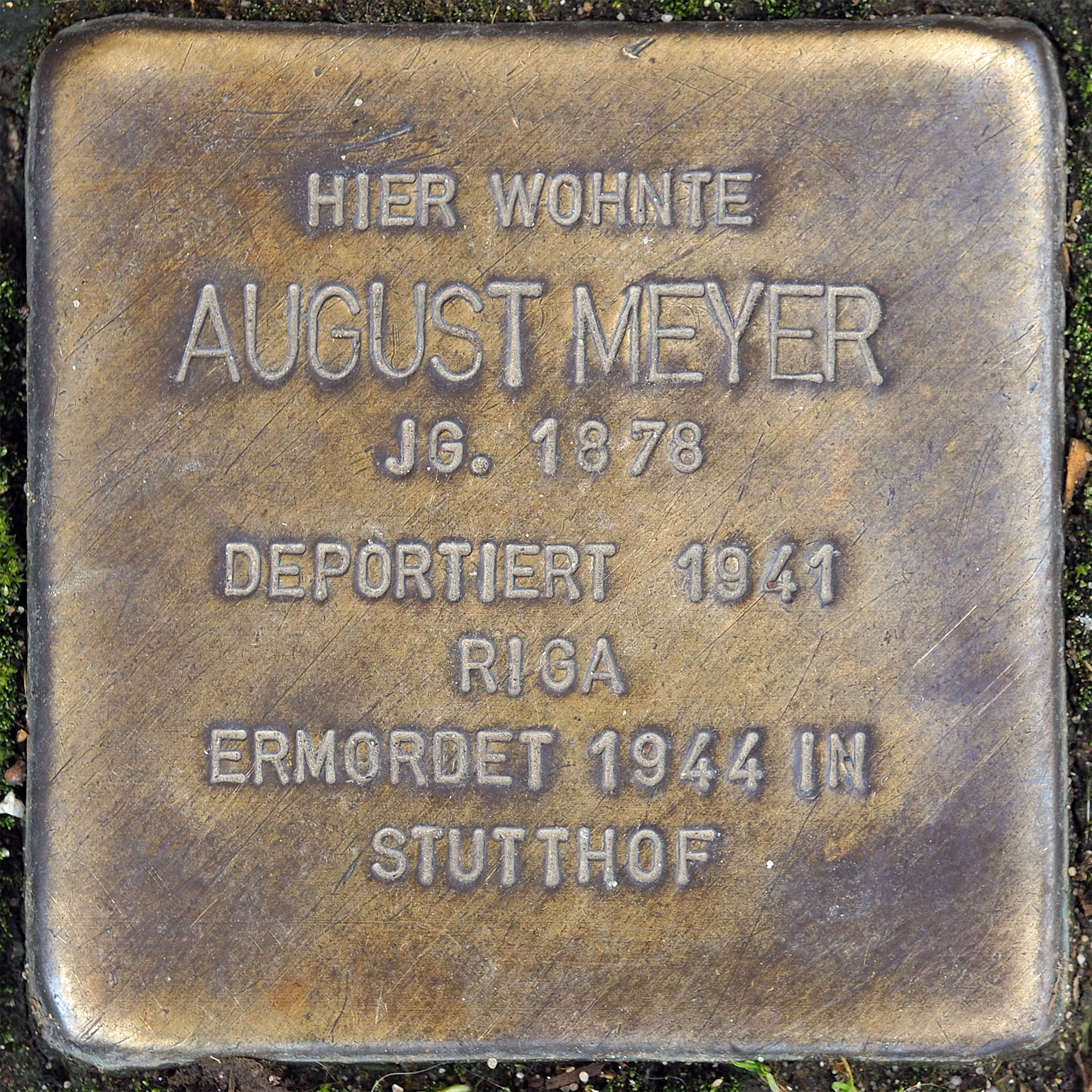 Stolpersteine MG: Meyer, August